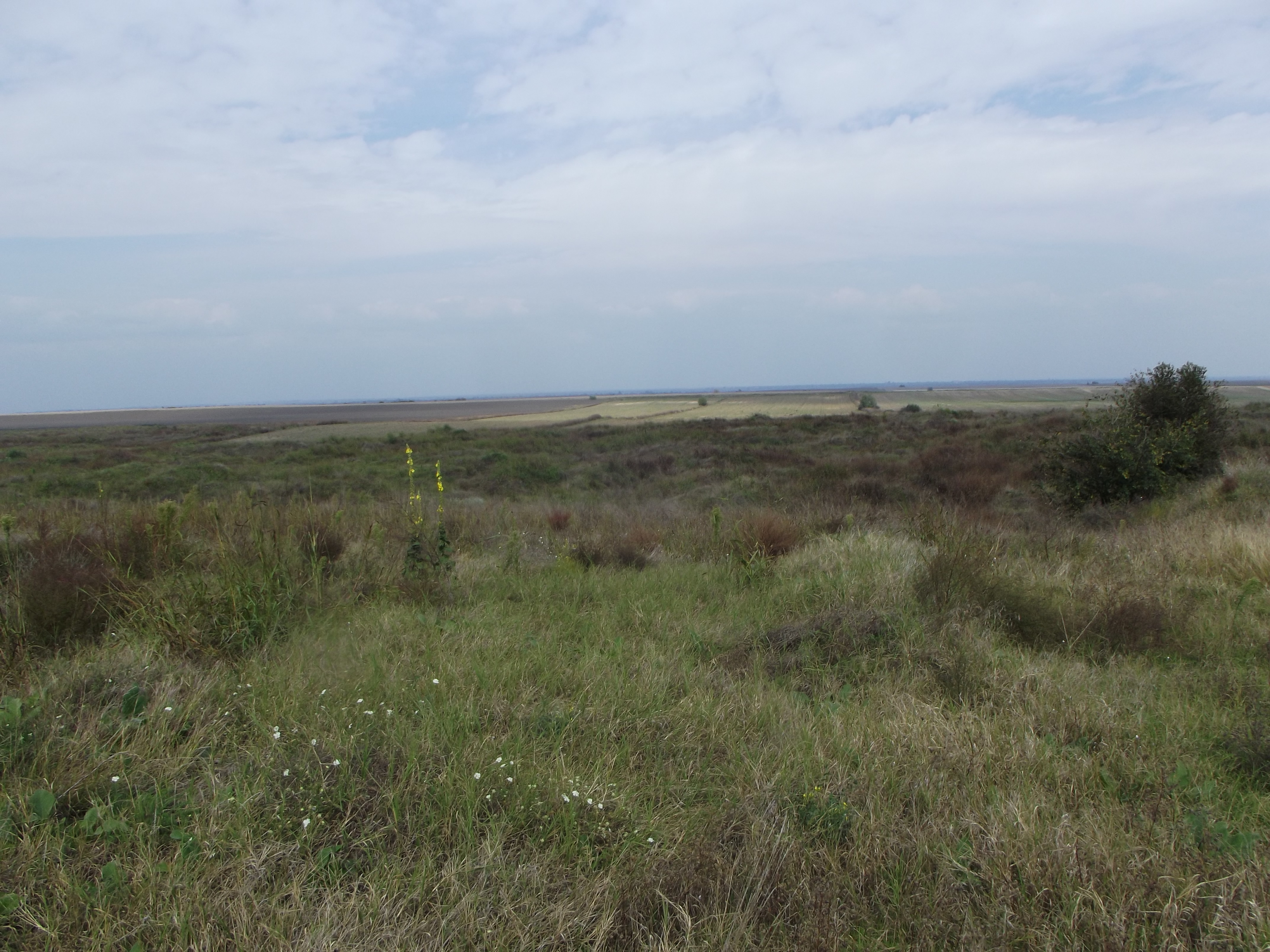 Иманярски набези в местност Мъгура, Ново село, Видинско